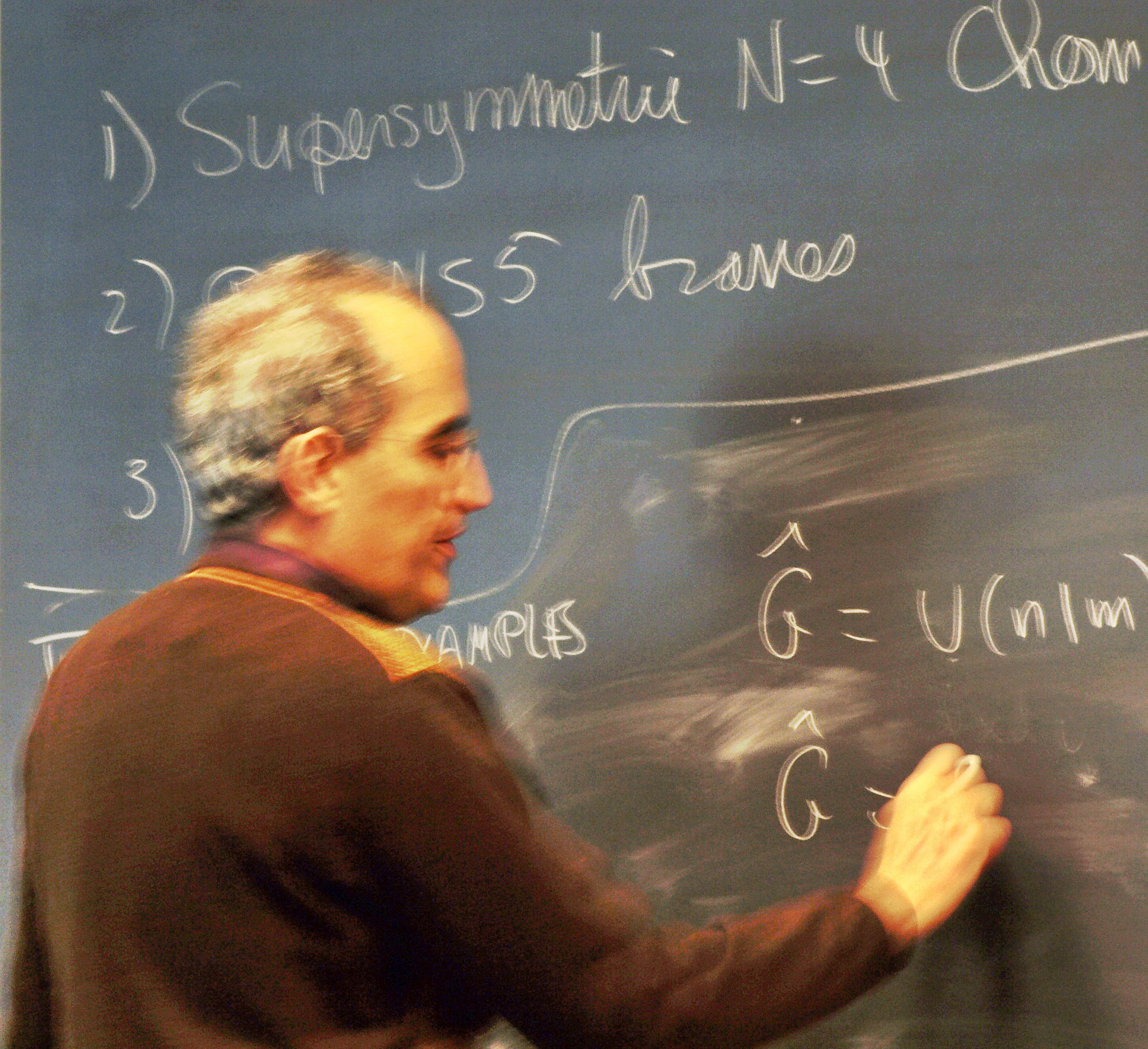 Edward Witten giving a speech at Chalmers tekniska högskola, Göteborg, Sweden